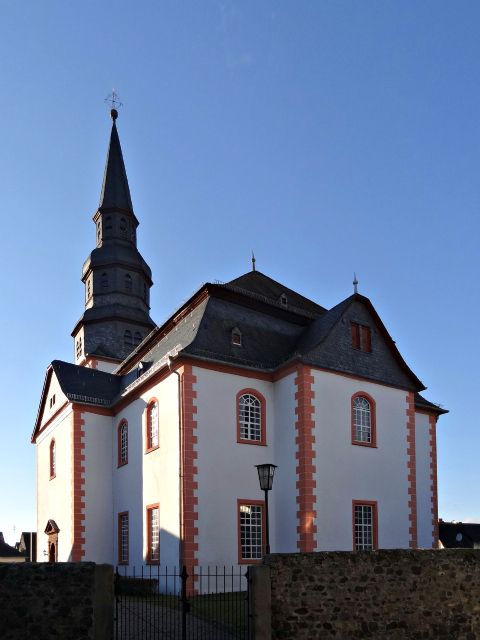 Evangelische Pfarrkirche (Gambach)